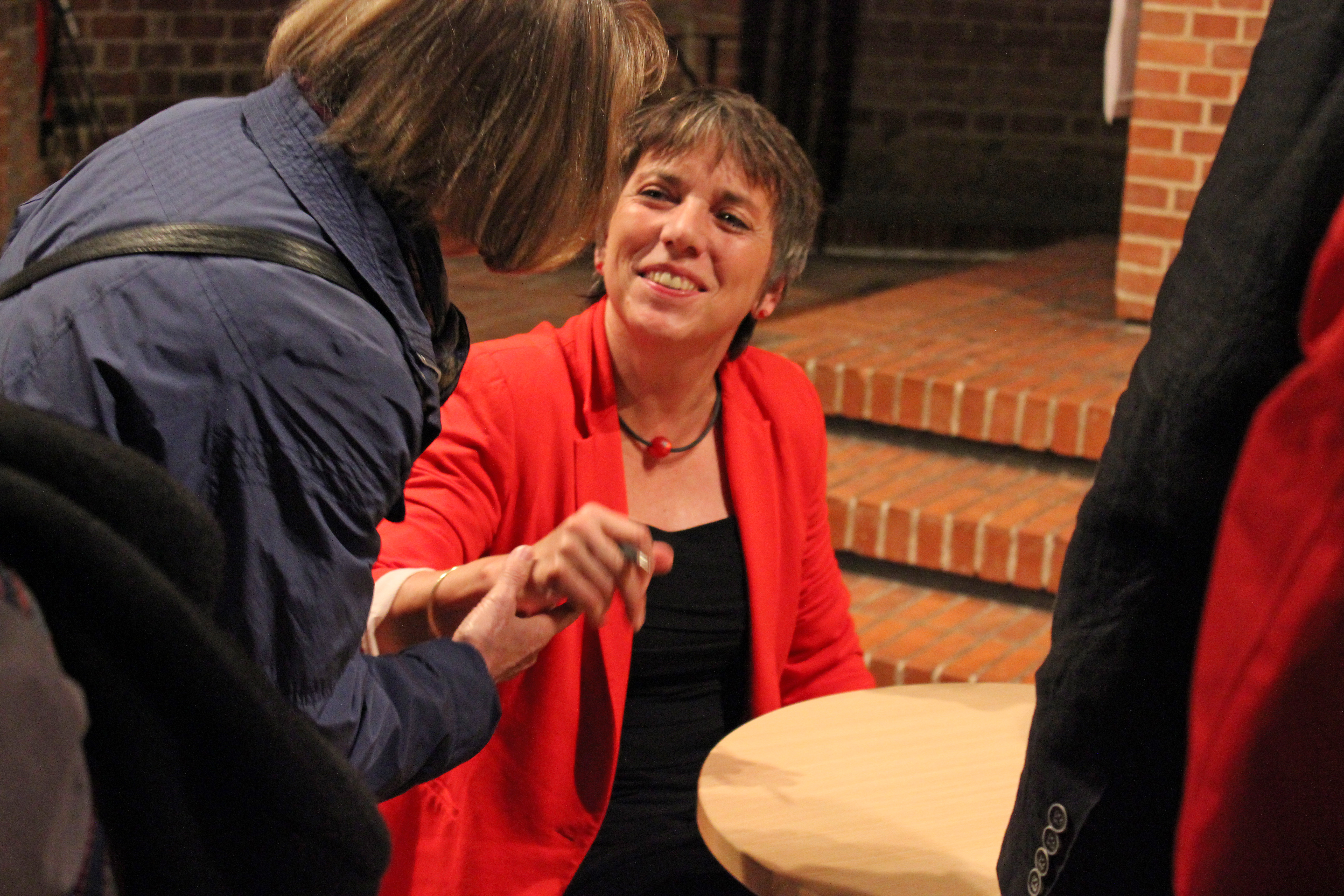 Buchpräsentation: Entrüstet Euch! In der Marktkirche Hannover stellten am 16. April 2015 Dr. Margot Käßmann und Konstantin Wecker ihr gemeinsames Buch vor. Moderation: Ralph Ludwig